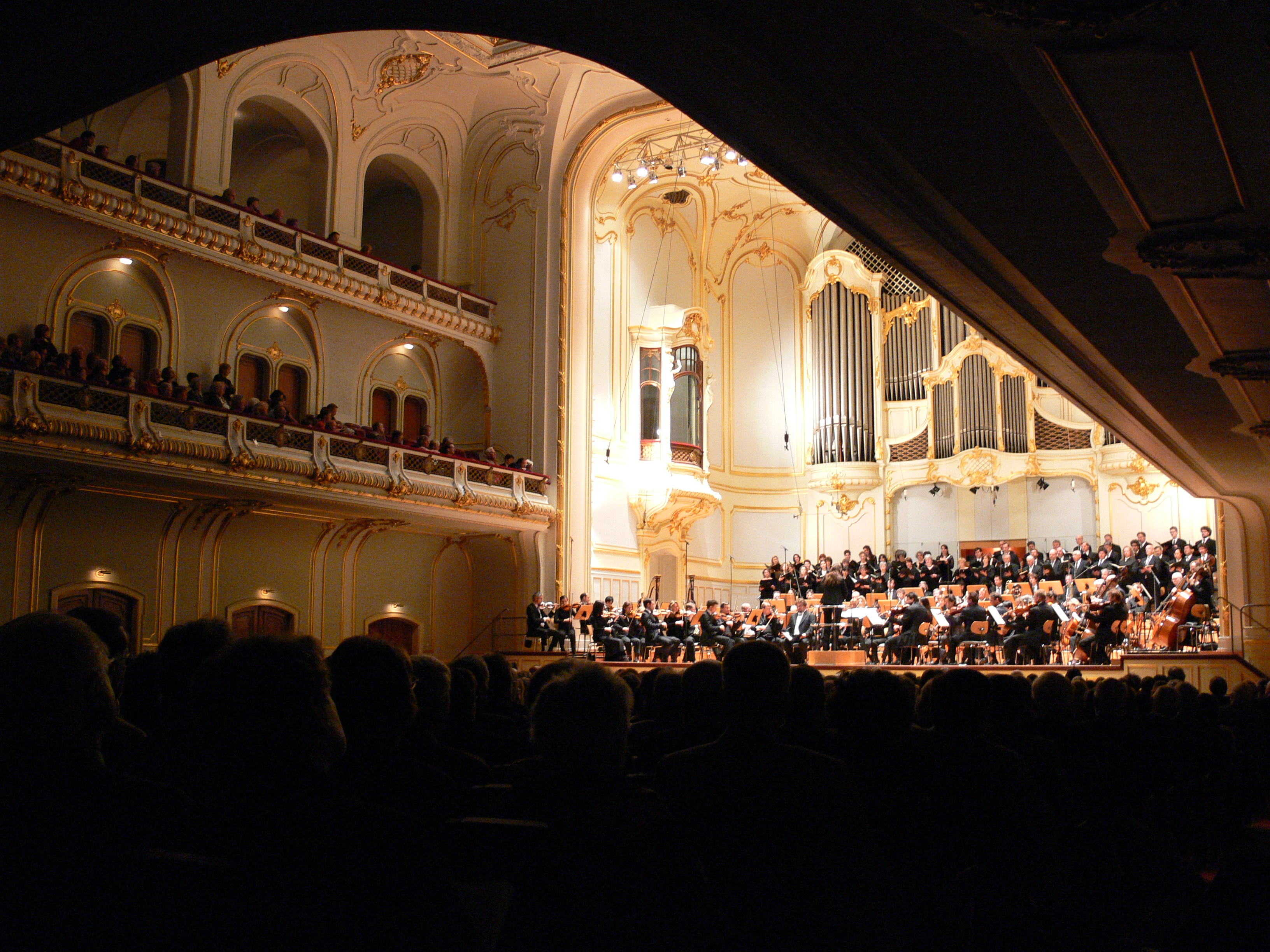 Die Philharmoniker Hamburg und der NDR-Chor; Großer Saal, Laeiszhalle, Hamburg